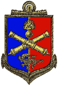 Insigne de l'école d'application d'artillerie.